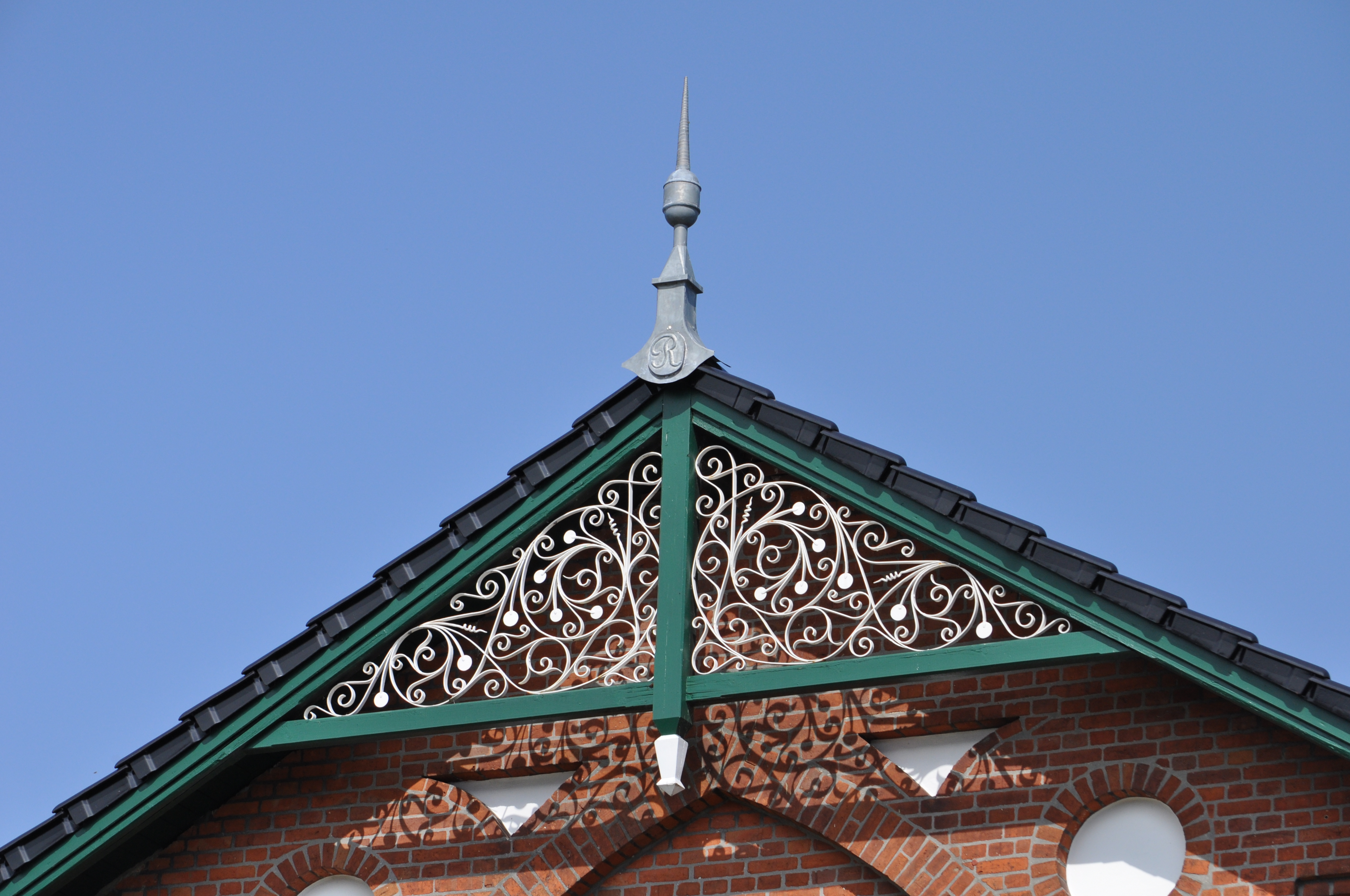 Giebelschmuck an einem Hof in Mözen.